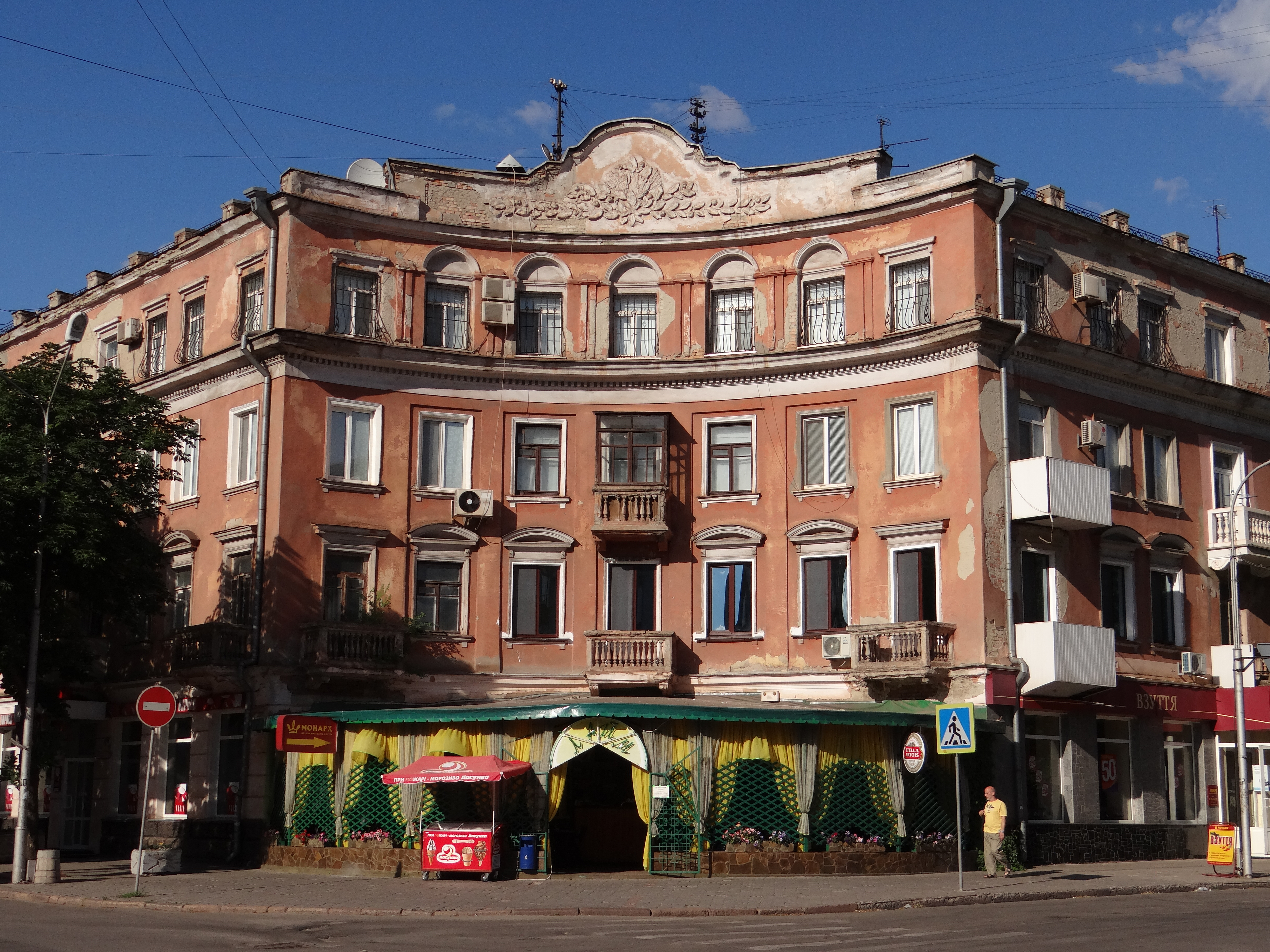 Житловий будинок (будинок тресту "Дзержинськруда", 1949р.), Кривий Ріг, проспект Карла Маркса, 16